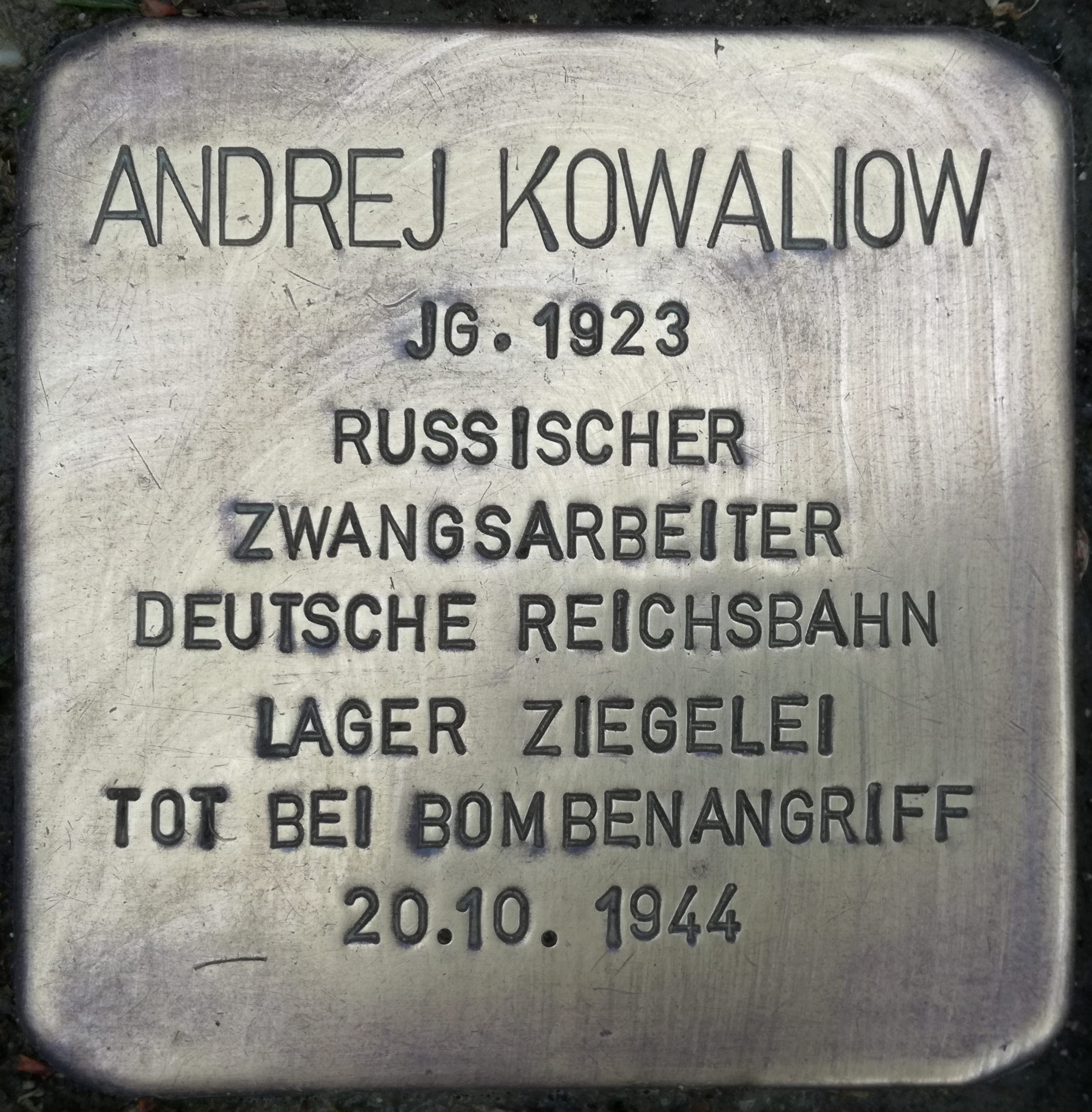 Andrej Kowaliow Jahrgang 1923 Russischer Zwangsarbeiter Deutsche Reichsbahn Lager Ziegelei tot bei Bombenangriff 20.10.1944